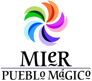 Pueblo Magico